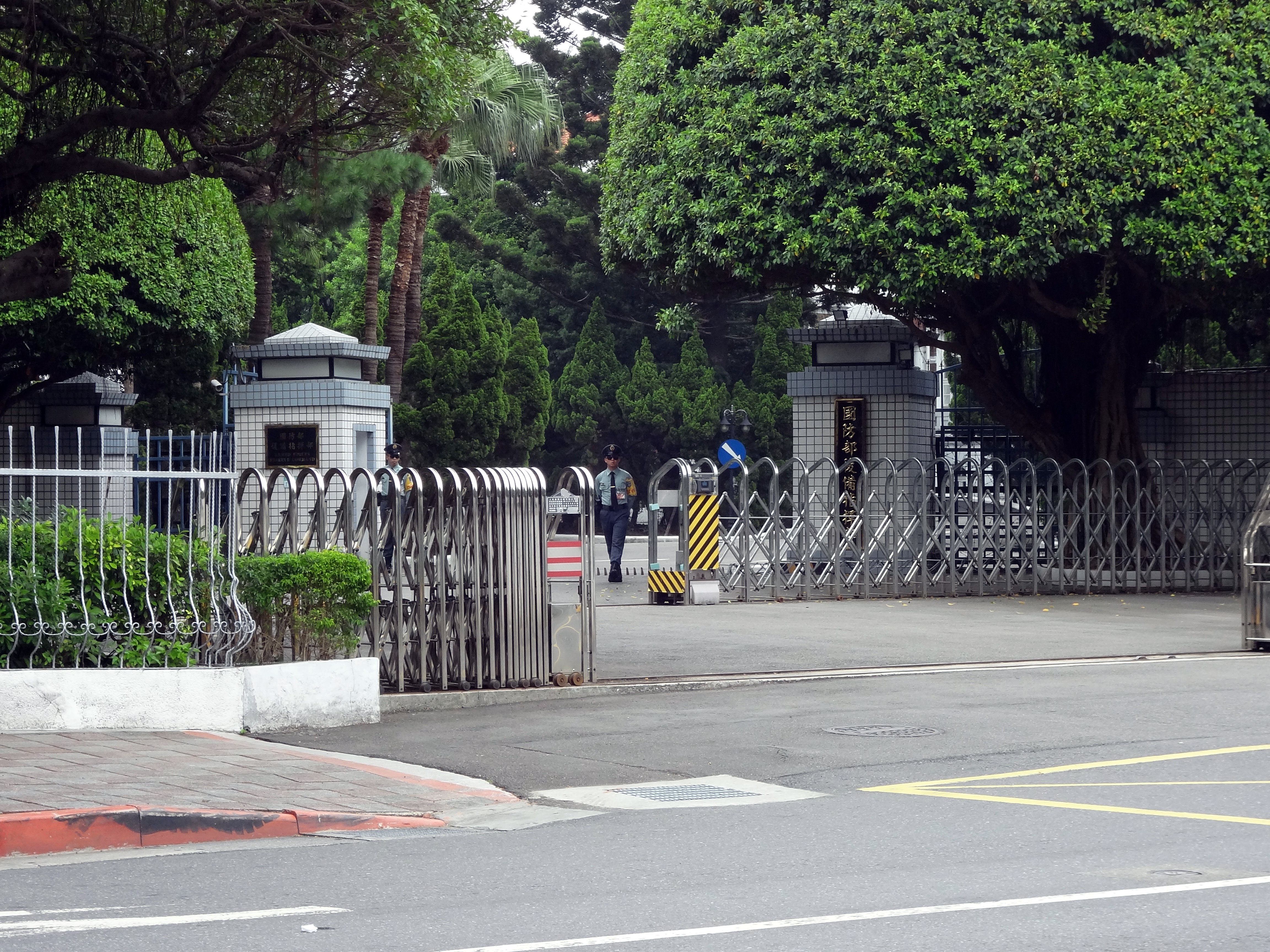 中華民國國防部後備指揮部，位於臺北市中正區博愛路172號。